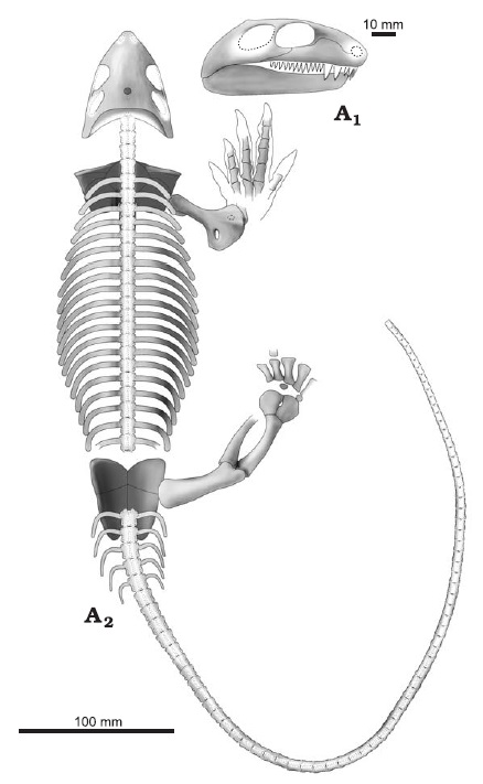 Datheosaurus macrourus Schroeder, 1904 (Upper Pennsylvanian, Poland).